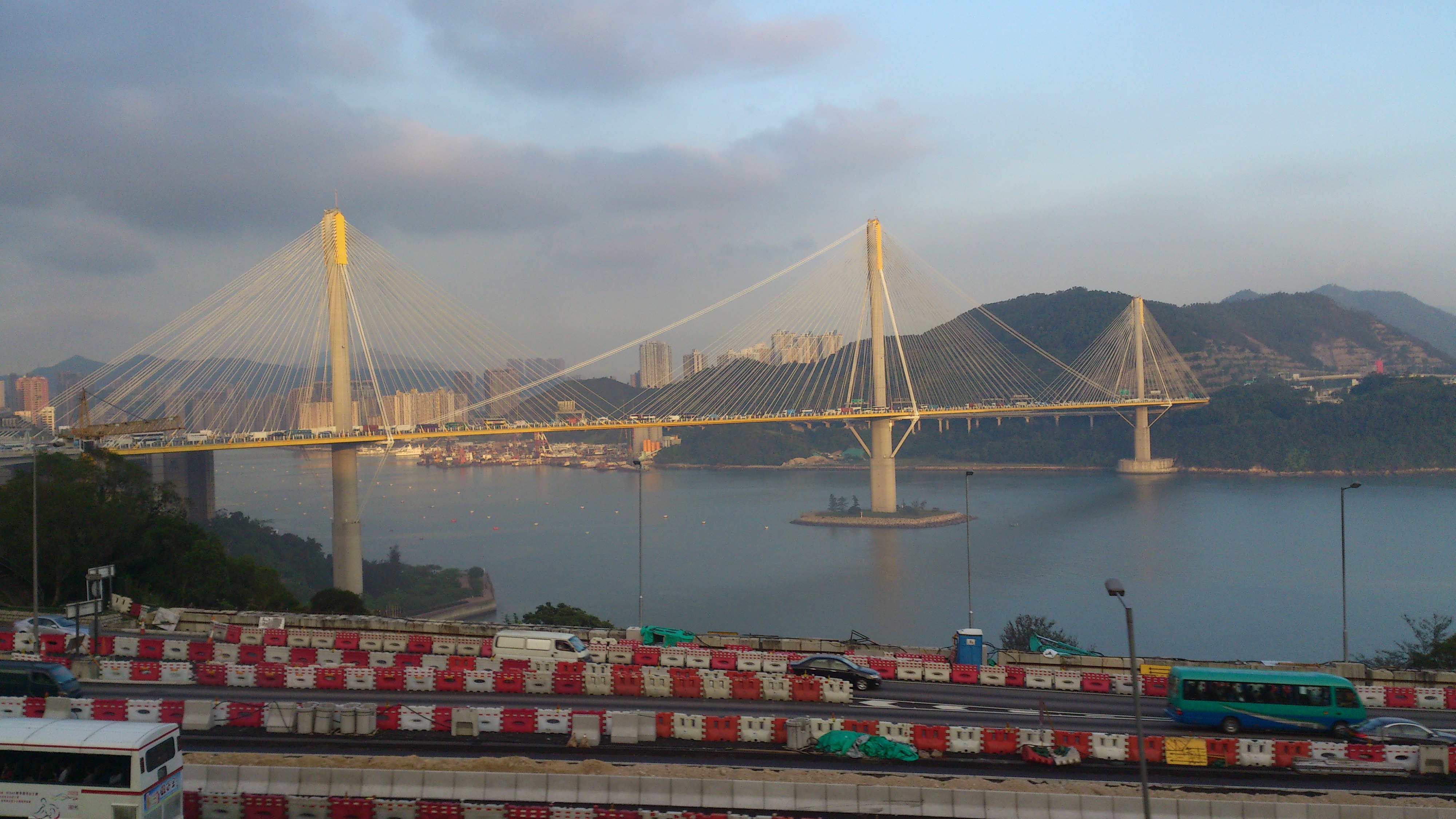 汀九橋